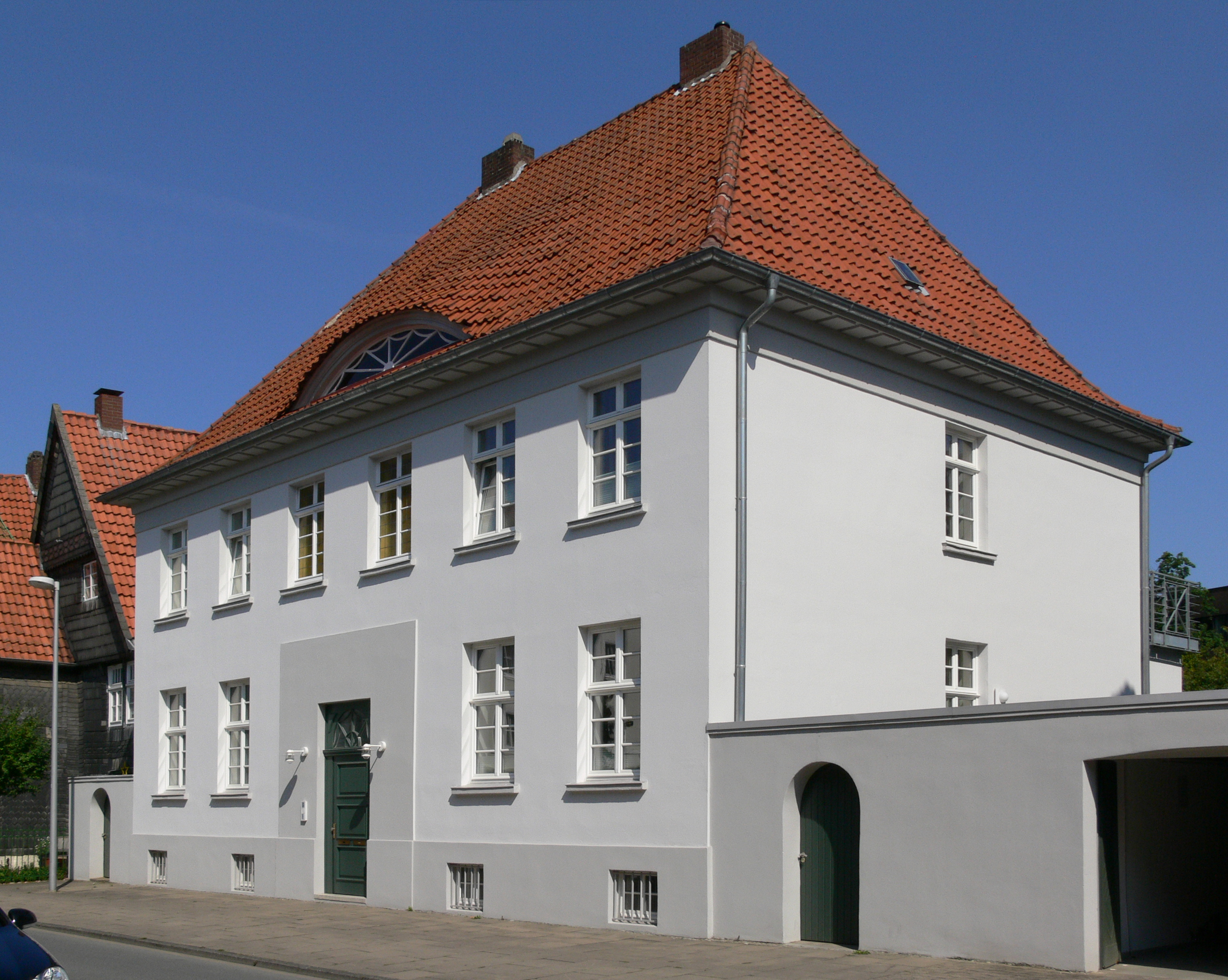 Herford, Löhrstraße 9, Baudenkmal